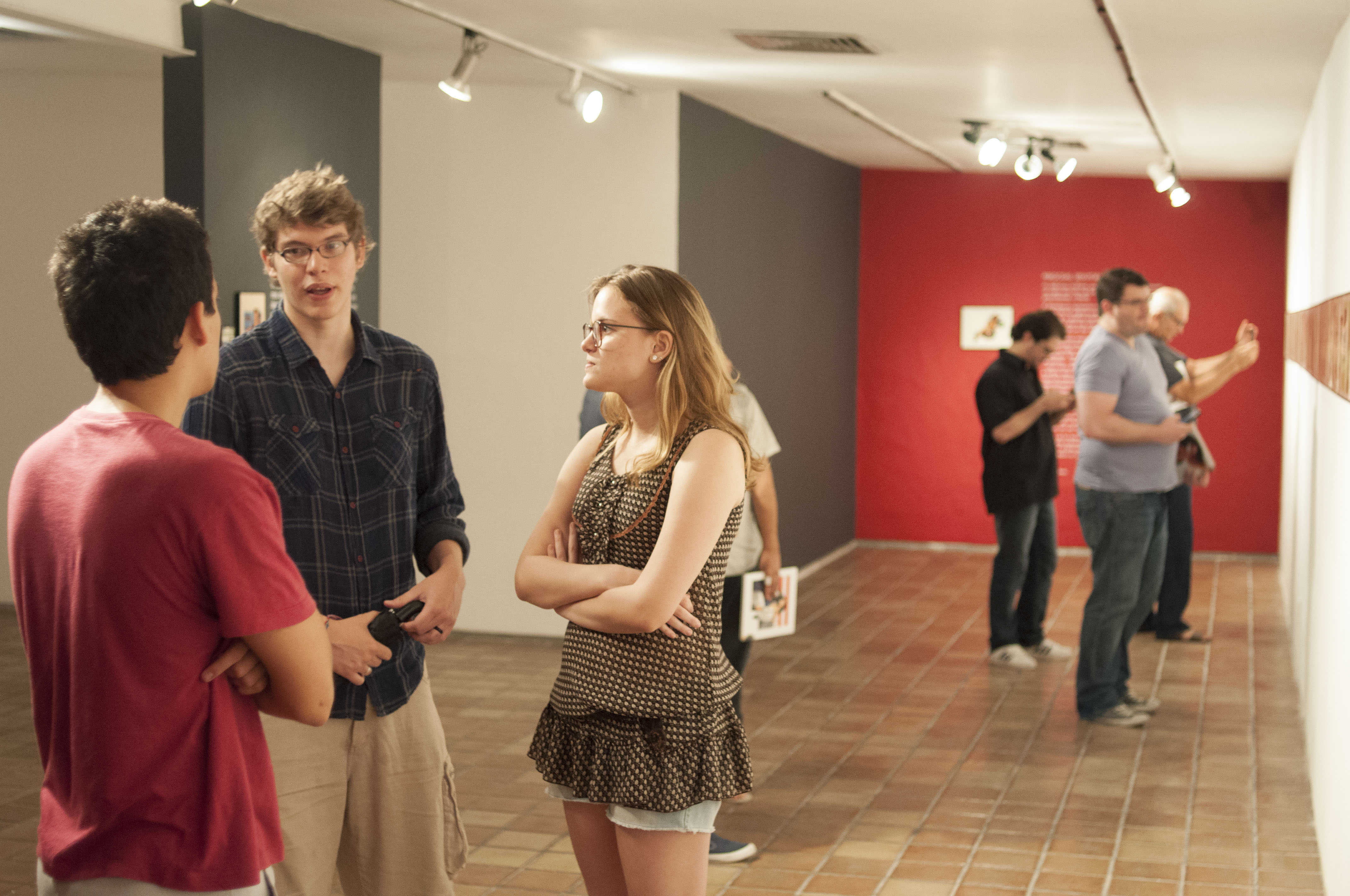 Interior do Museu Murillo La Greca - Recife, Pernambuco, Brasil.